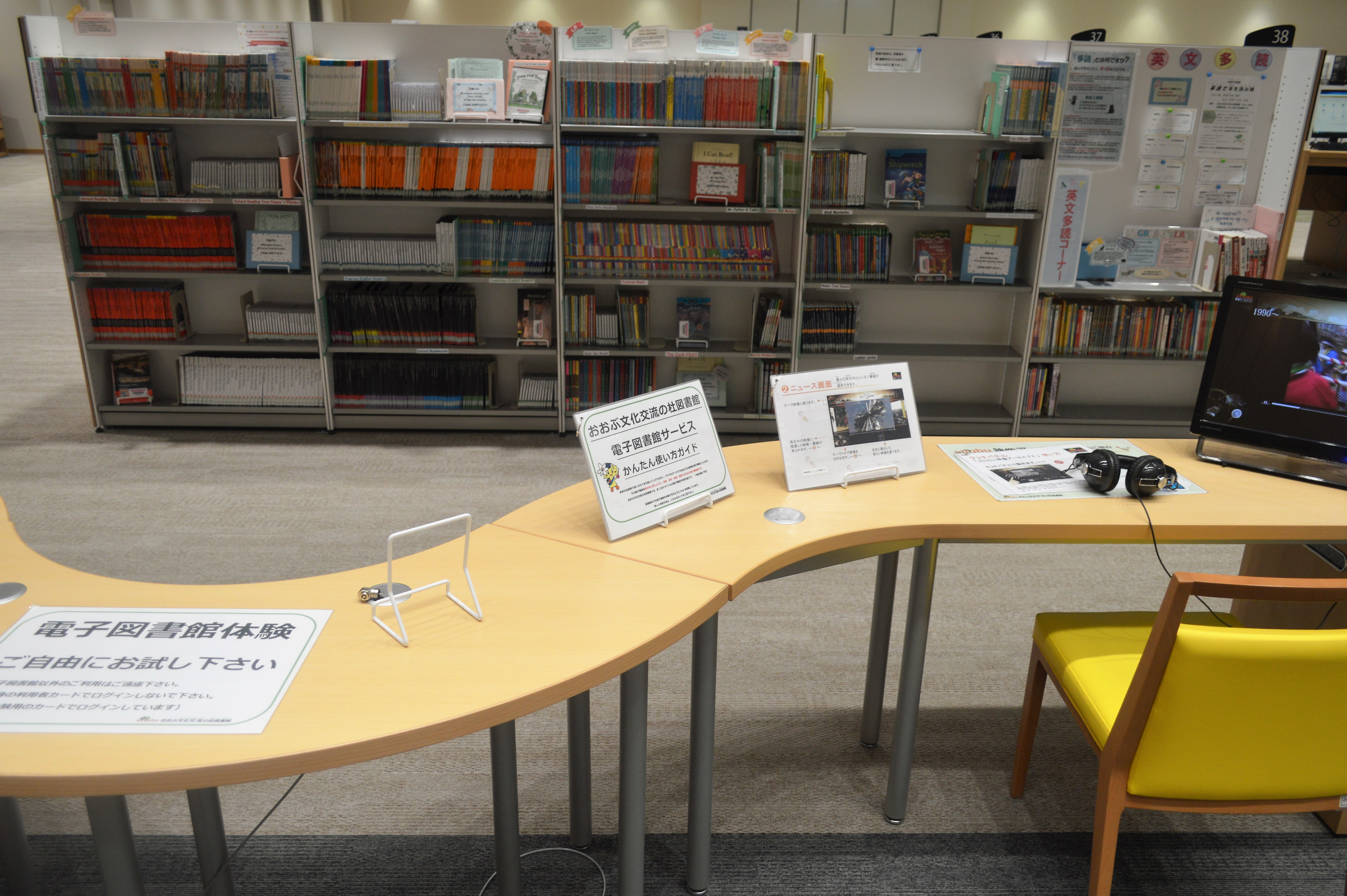 愛知県大府市。おおぶ文化交流の杜図書館。電子書籍の体験コーナー。